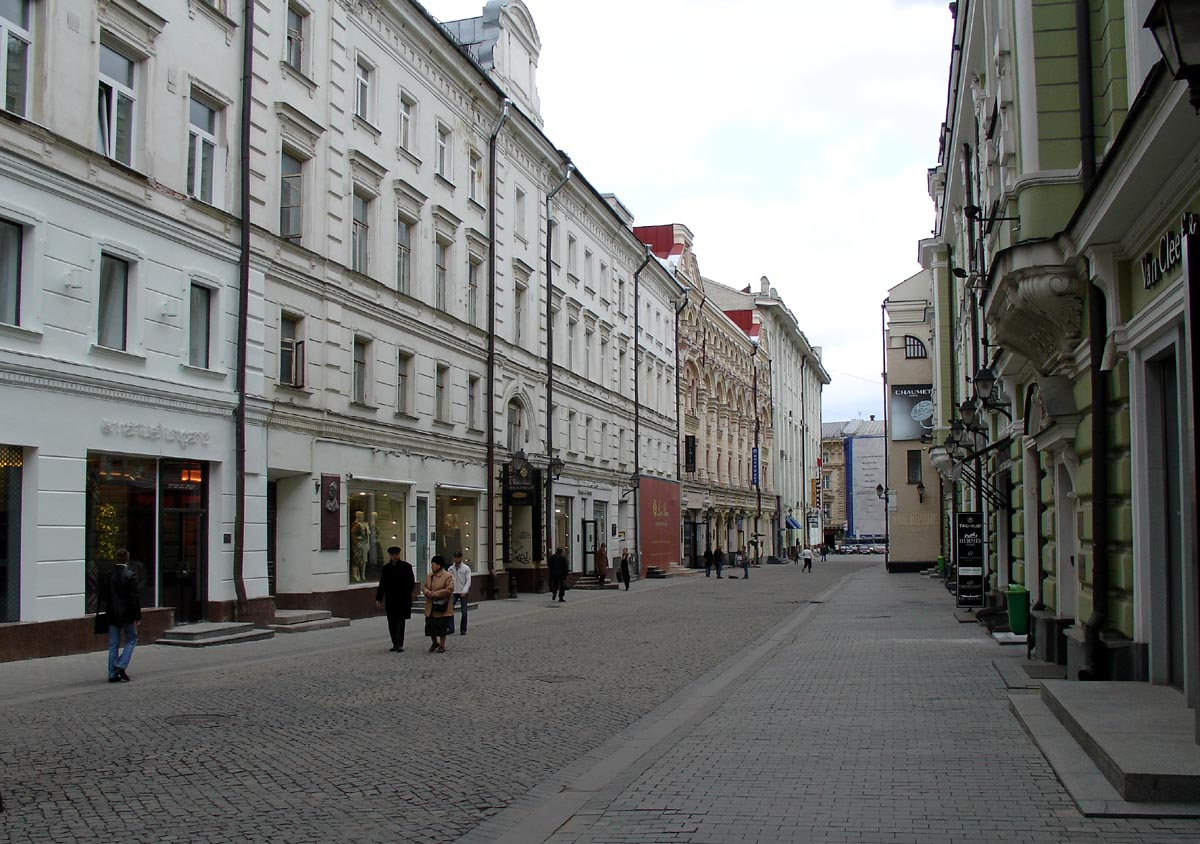 Stoleshnikov Lane, Moscow